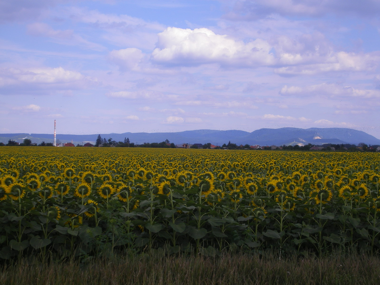 Ebed - tájkép a falutól északra